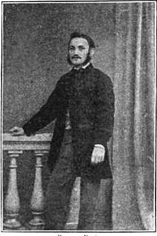 August Perl von 1866-1867 Präsident des Allgemeinen Deutschen Arbeiterverein